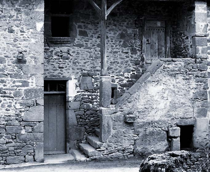 Ancienne maison de type creusois au lieu-dit de Lascoux dans la commune de Jouillat